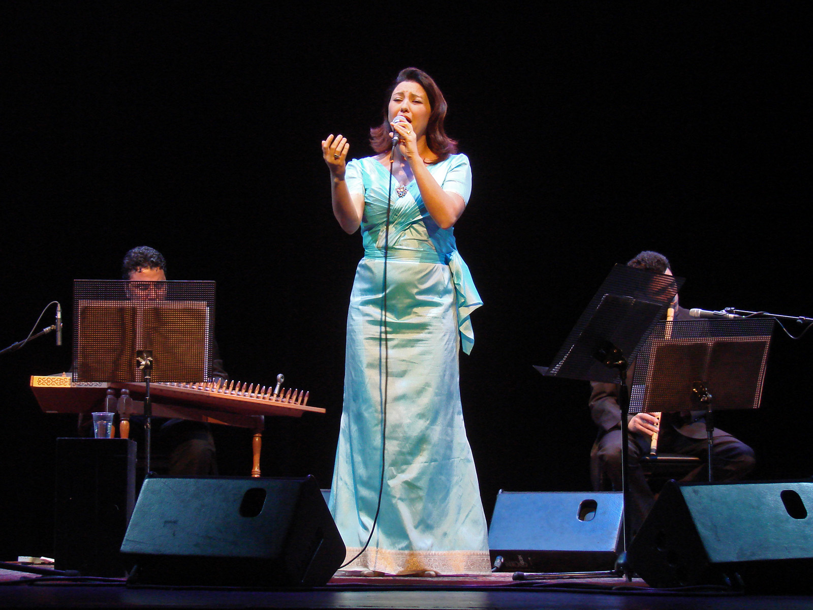 Concert "Le voyage en Méditerranée" Sonia M'barek et ses musiciens (de gauche à droite : Slim Jaziri : kanoun ; Sonia M'barek, chant ; Nabil Abdemouleh, flûte nây) Festival de l'Imaginaire 2009 Institut du Monde Arabe Maison des cultures du Monde